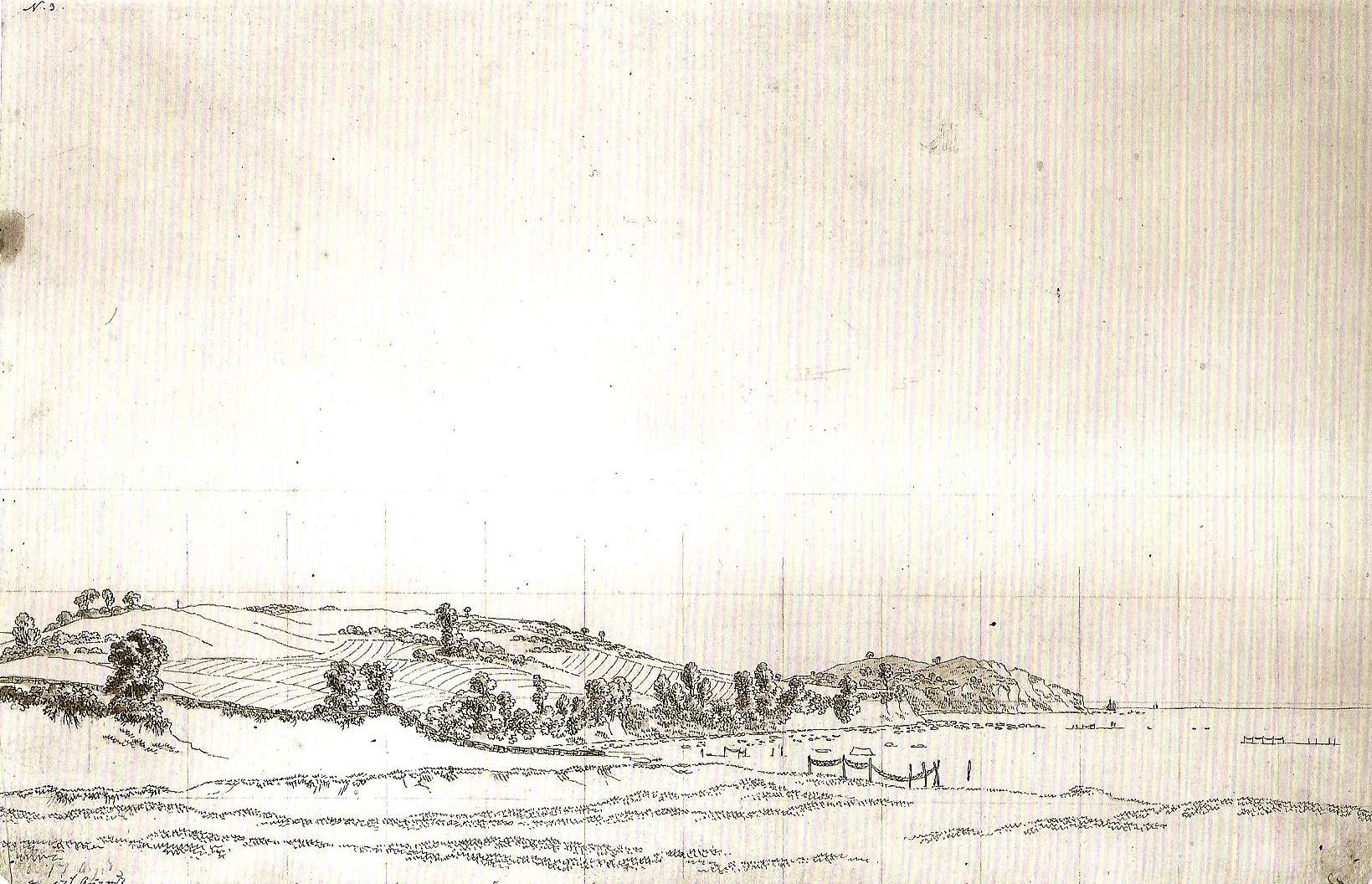 Südküste von Rügen (Mönchgut), 17. August 1801, Sepia, 23,1 x 36,6 cm